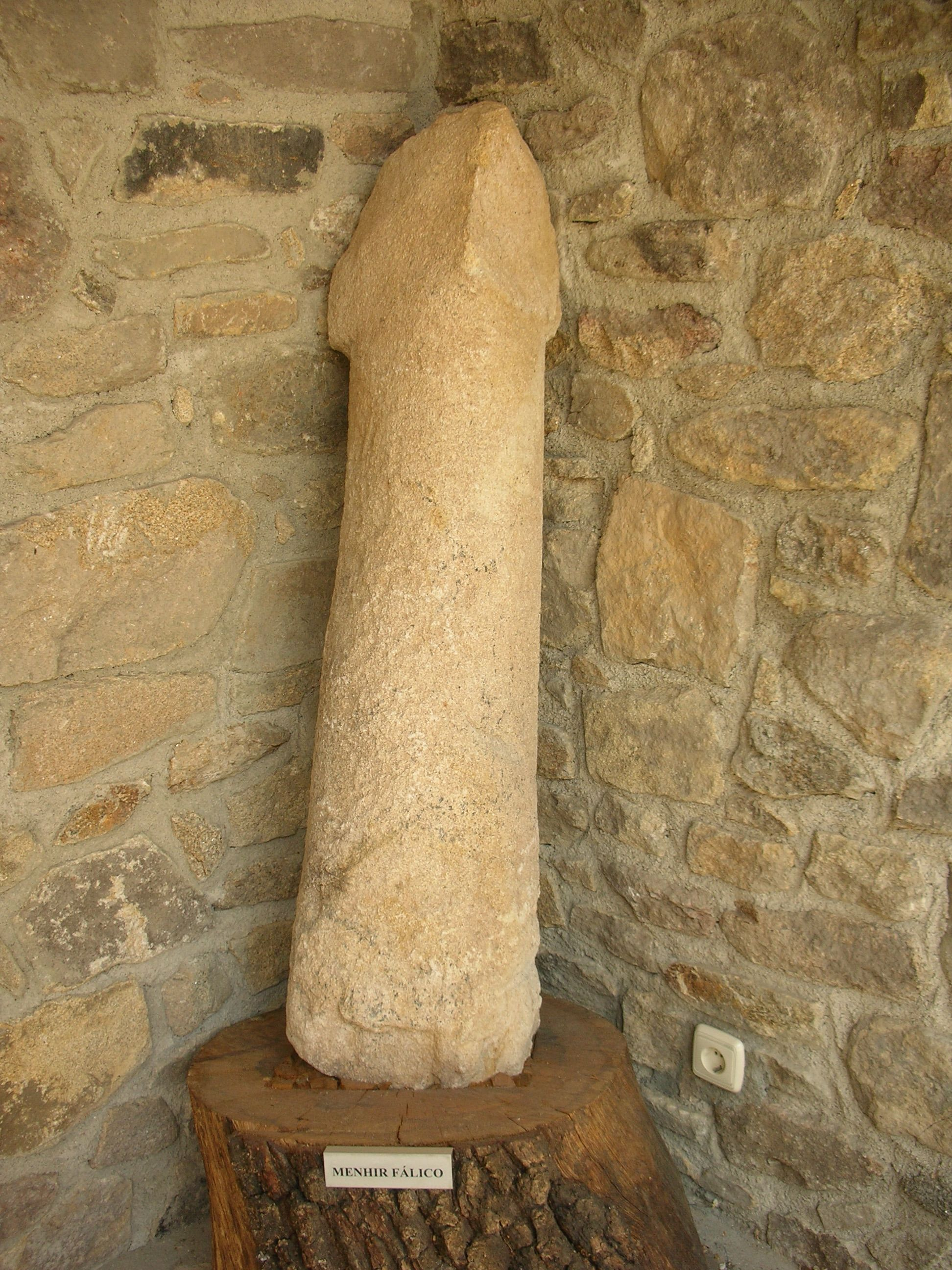 Menhir fálico en el museo de Vilvestre, provincia de Salamanca, España.